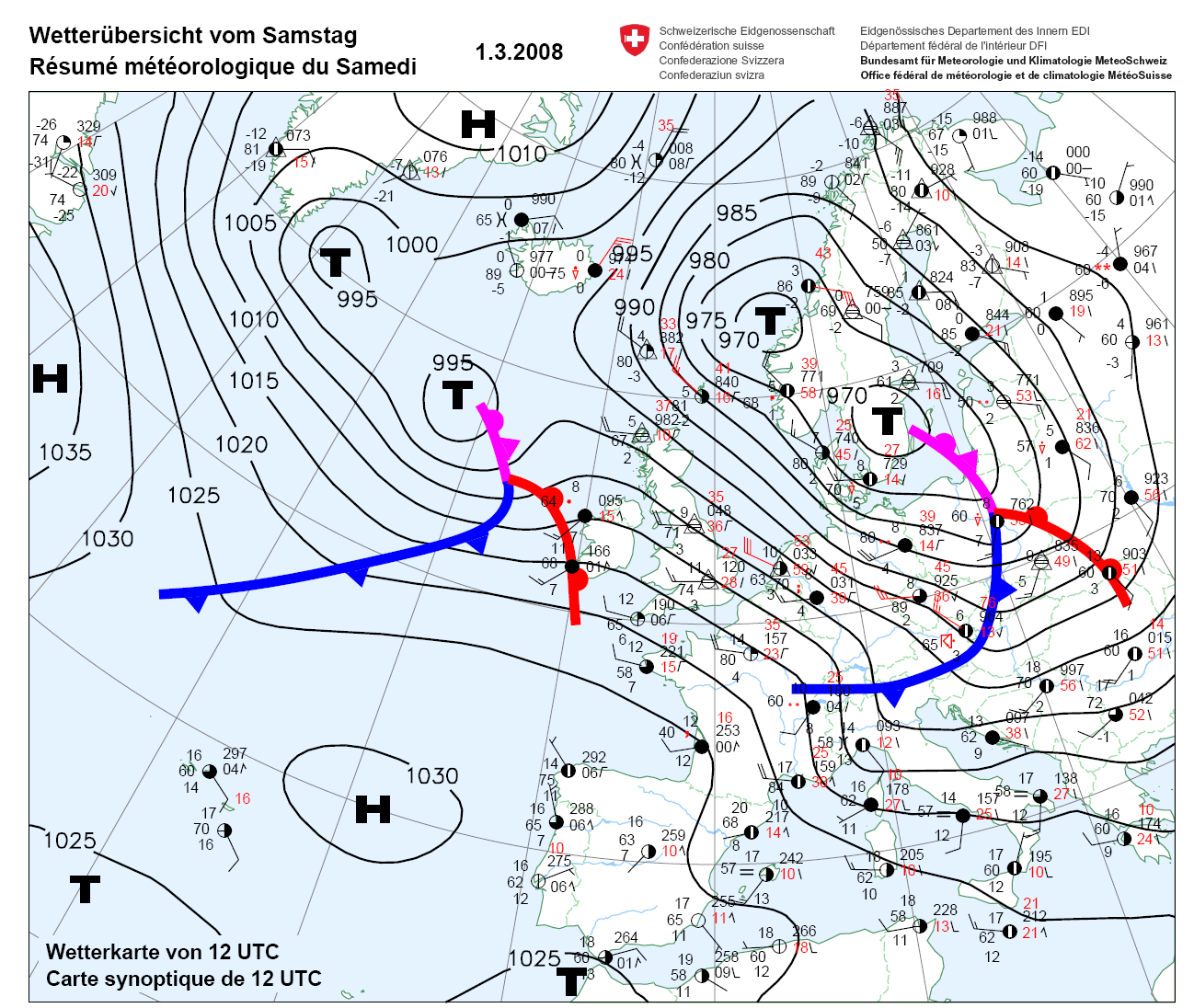 Wetterlage beim Orkan Emma